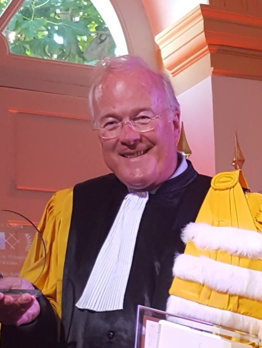 Peter McPhee à l'occasion de la cérémonie Docteur Honoris Causa à l'Université de Perpignan